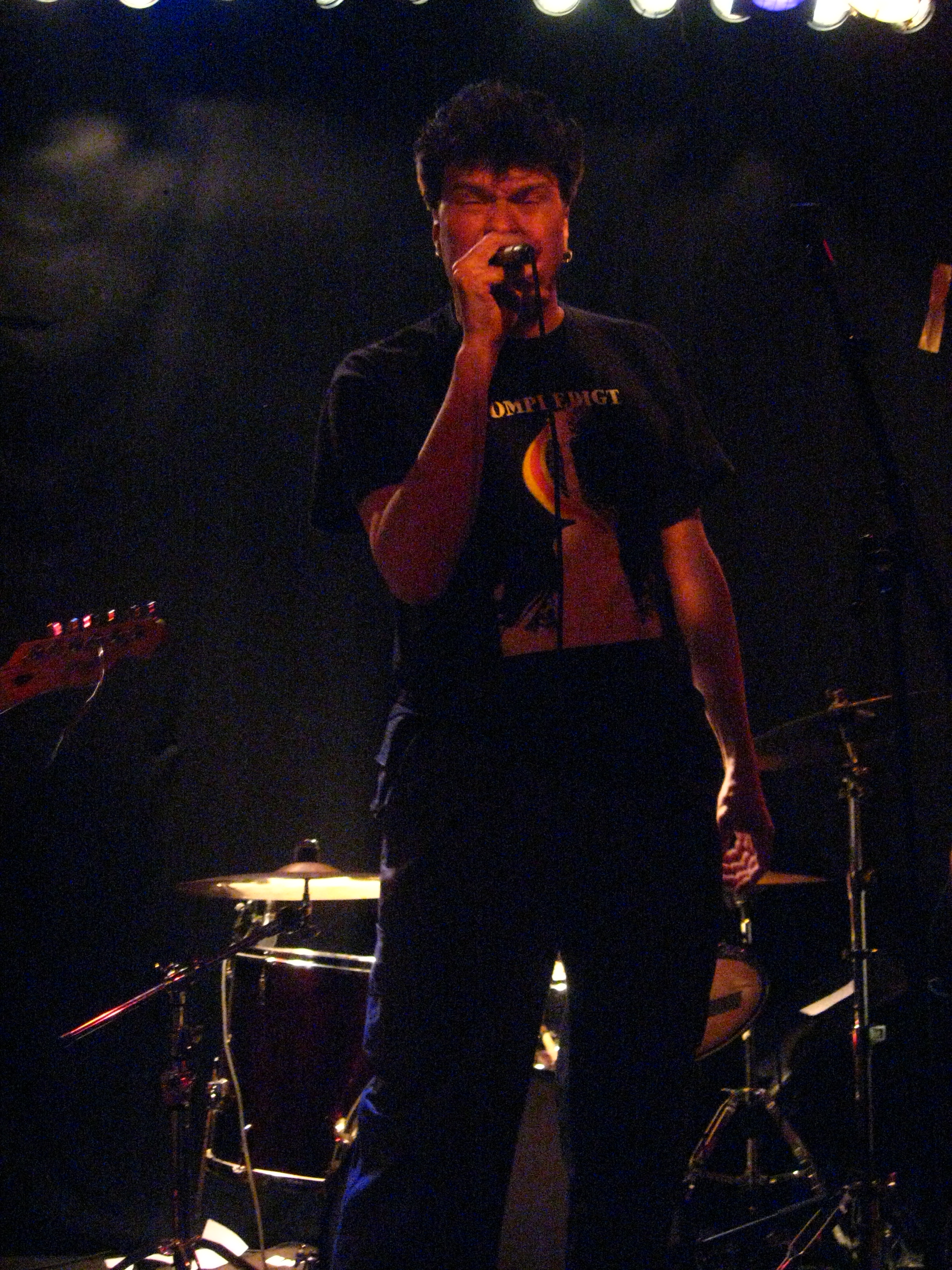 Monark X (feat. Johan Johansson)